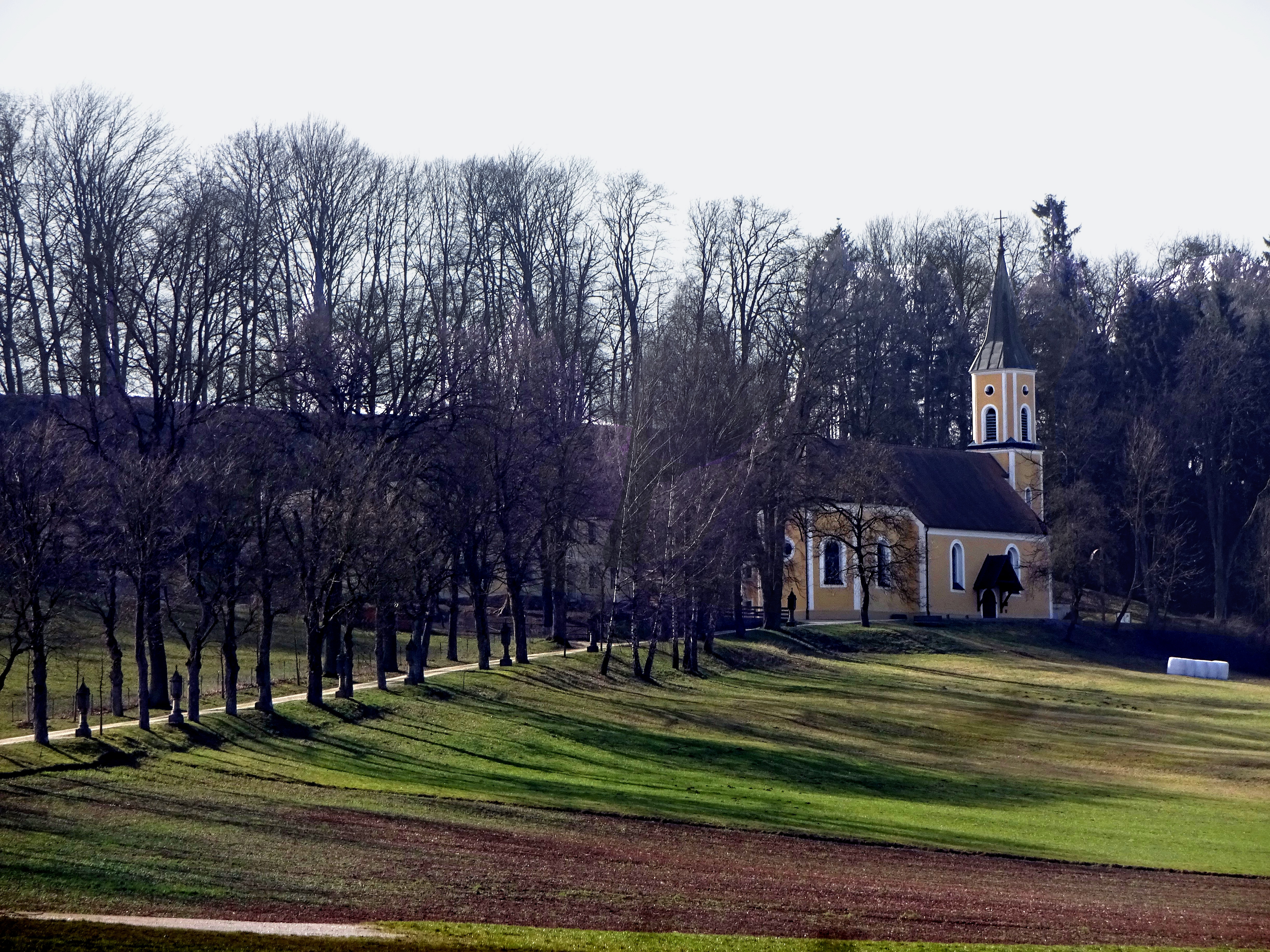 Katholische Wallfahrtskirche Unser Lieben Frau